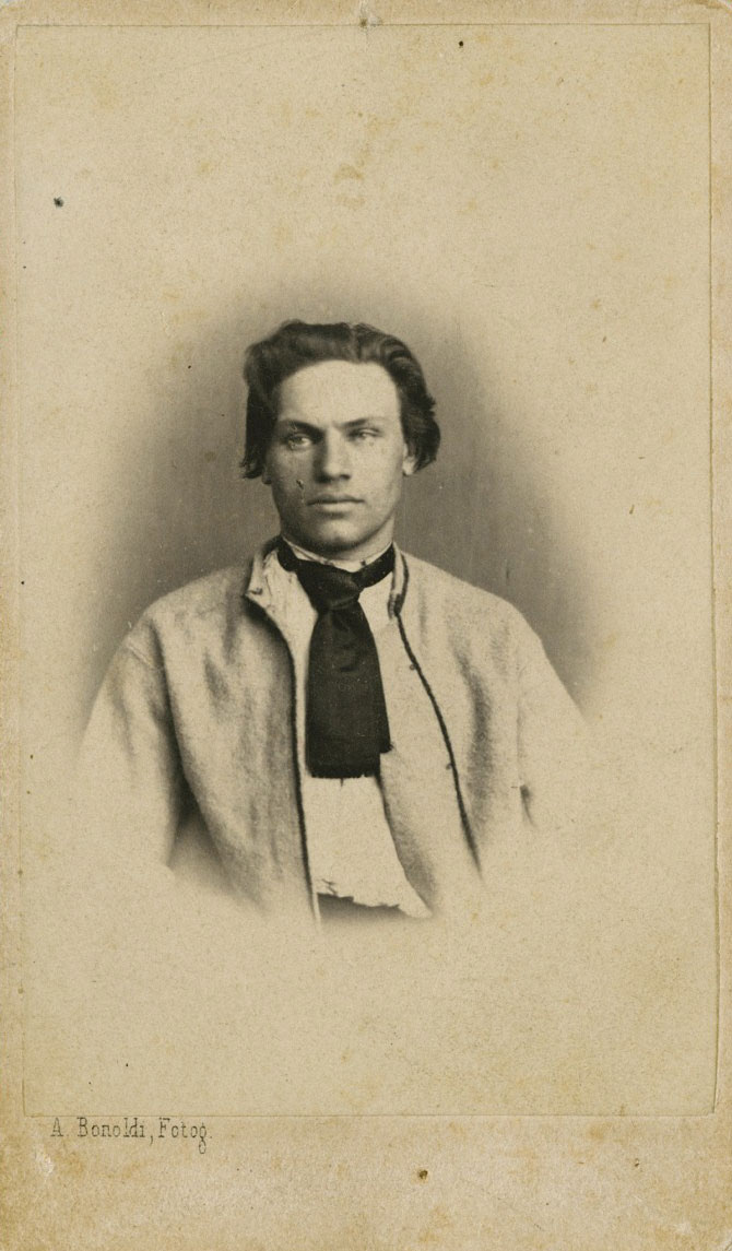 Беларуская (тарашкевіца): Партрэт Кастуся Каліноўскага (Kastuś Kalinoŭski)